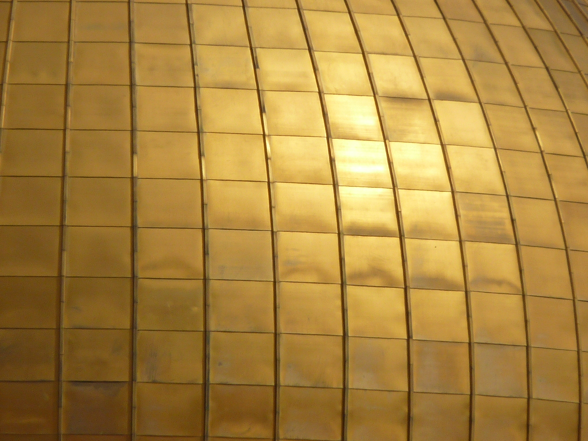 Jerusalem Jerusalem